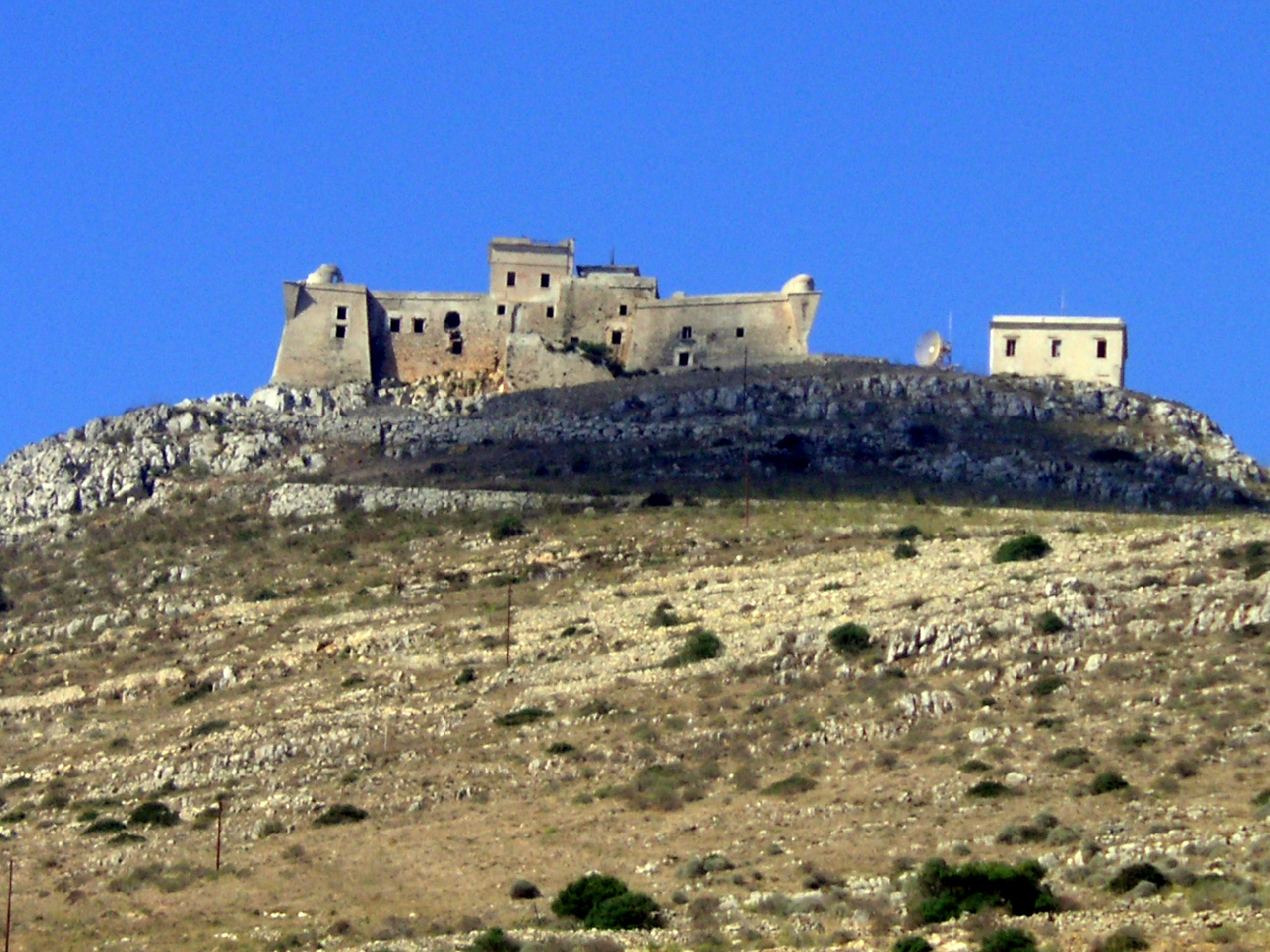 Zamek na Favignanie